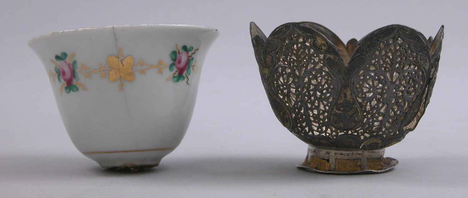 Cup holder; Metal